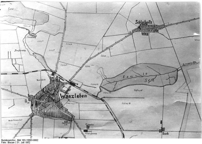 Karte des Gebiets Wanzleben mit "Faule See" Zentralbild Biscan 31.7.1952 113 Hektar Ödland werden kultiviert. Inmitten der fruchtbaren Magdeburger Börde liegt der 113 ha große Faule See bei Wanzleben, der zwar schon vor Jahren trockengelegt, bisher aber noch nicht landwirtschaftlich genutzt wurde. Die Landesregierung von Sachsen-anhalt hat nun die erforderlichen Mittel für die Kultivierung des Faulen Sees zur Verfügung gestellt und die MAS Domersleben beauftragt, die Arbeiten durchzuführen. Im nächsten Jahr werden den Bauern von Wnazleben, Schleibnitz und Buch 80 Hektar zusätzliches Weideland zur Verfügung stehen. 33 Hektar werden aufgeforstet. UBz: Ein Blick auf die im Zimmer des Einsatzleiters der MAS Domersleben hängende Karte. Östlich von Wanzleben der Faule See, der durch ein 12 Kilometer langes Grabensystem schon vor Jahren entwässert wurde. Seitdem ist aber nichts geschehen, die große Fläche landwirtschaftlich zu nutzen. Die MAS hat jetzt den Auftrag erhalten, diese für unsere Landwirtschaft bedeutungsvolle Aufgabe zu lösen.